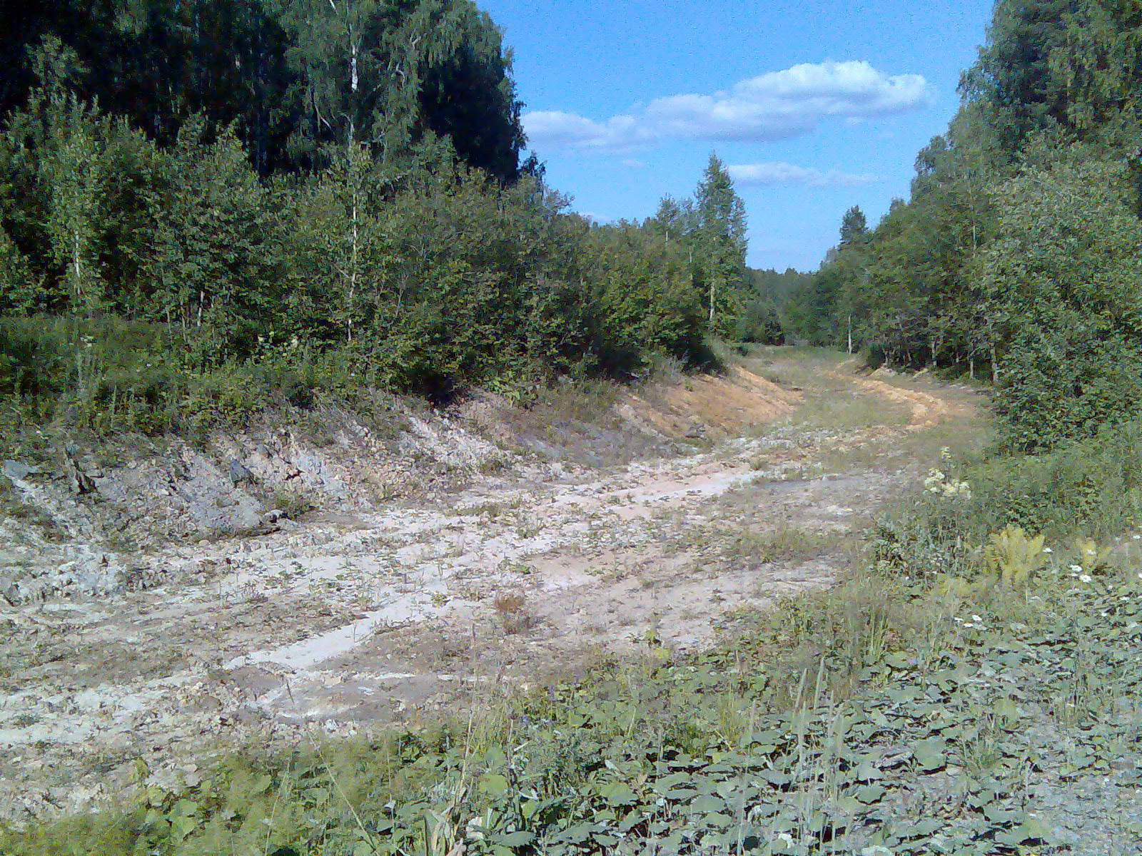 Полотно уничтоженной Яман-Елгинская узкоколейная железная дорога.